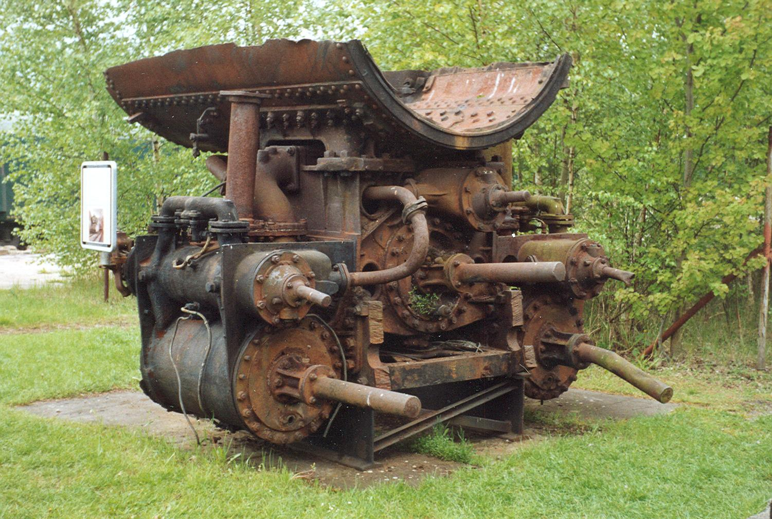 Zylinderblock der ehemaligen Schnellzuglokomotive 387.0